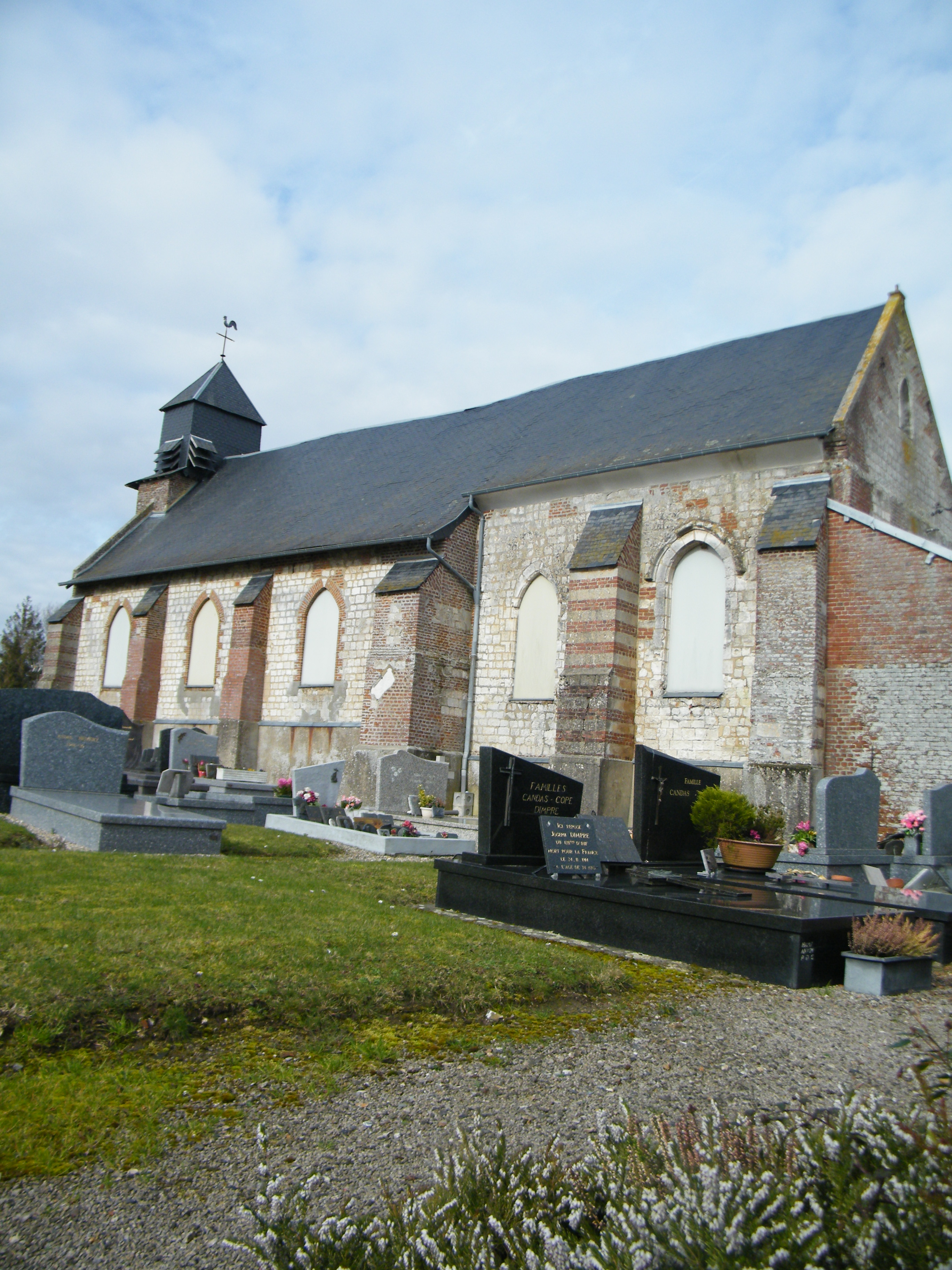 église